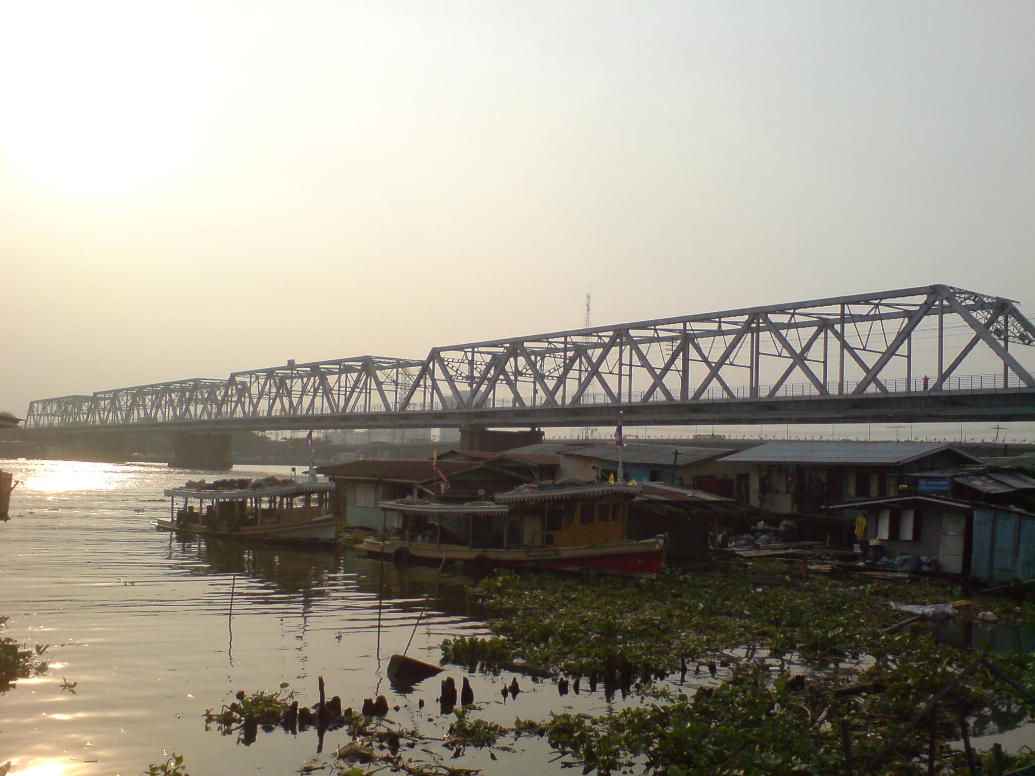 Rama VI Bridge